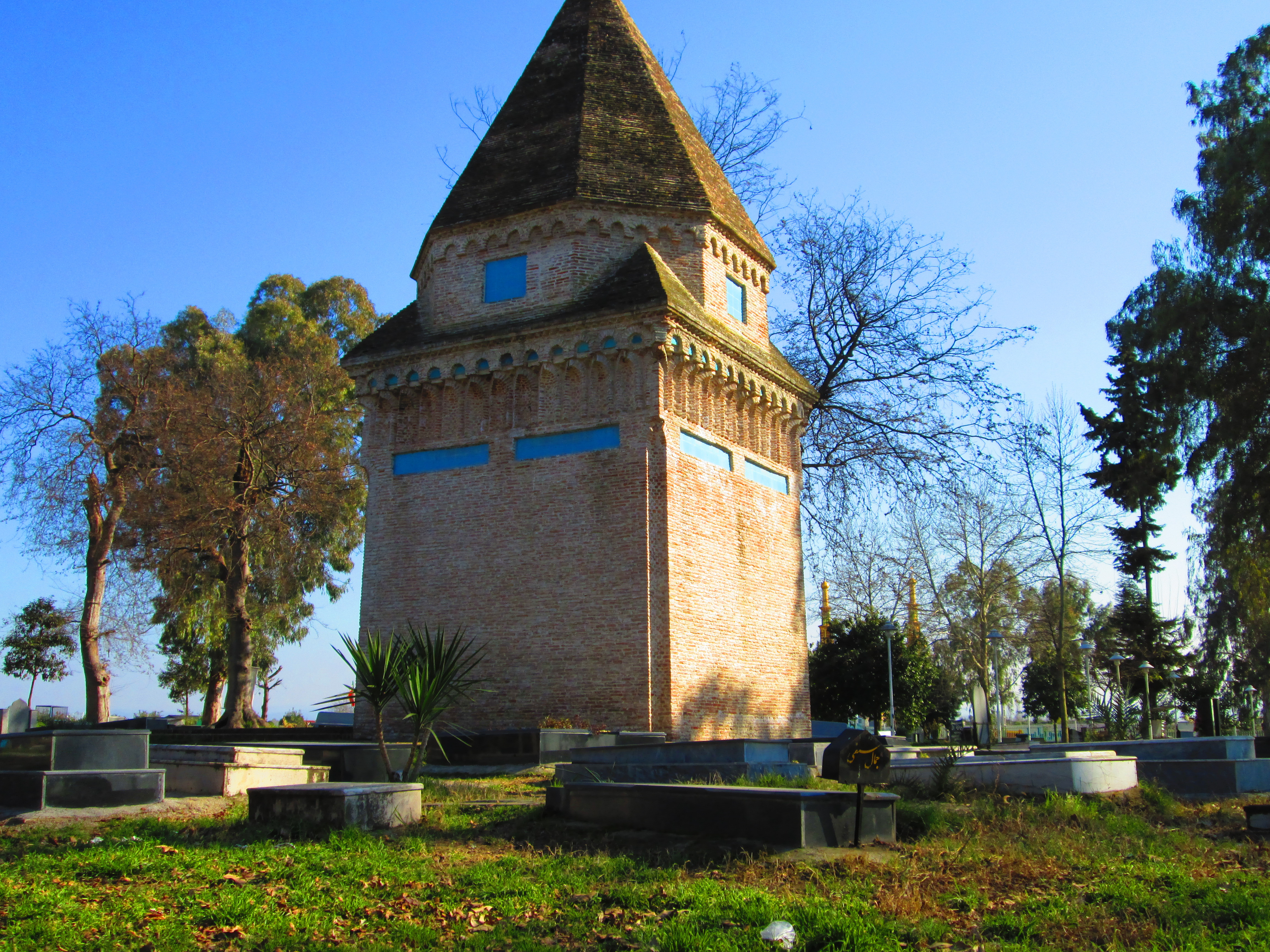 آرامگاه محمد زرین نوا